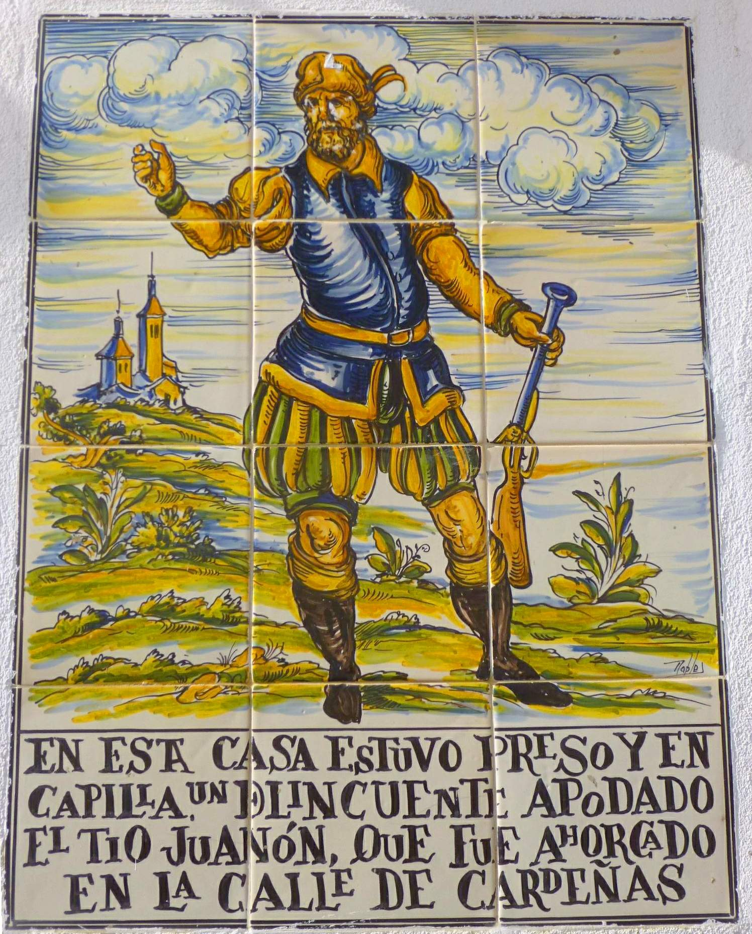 Navalcarnero (Comunidad de Madrid)